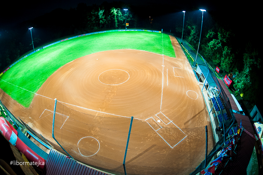 Softbalový stadion zvaný Krtkova aréna - domácí hřiště Pasos Pardubice